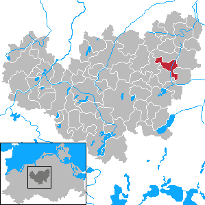 Jördenstorf in Mecklenburg-Vorpommern - District Güstrow